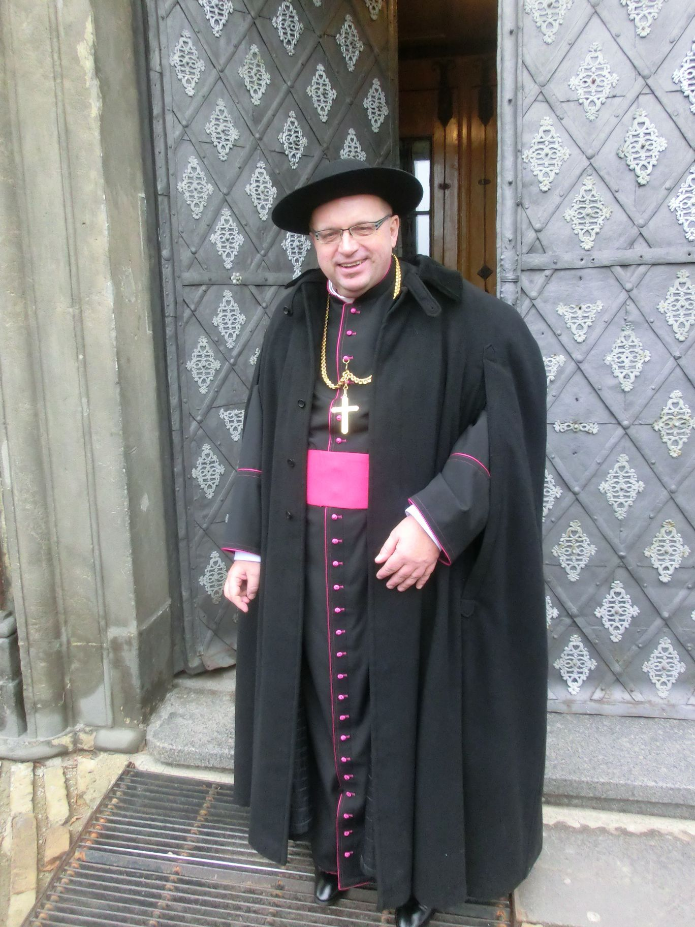 Probošt kapituly, prelát J.M. can. Jiří Hladík, OCr. před katedrálou sv. Štěpána v Litoměřicích po Novoroční mši svaté v 10 hodin dne 1. ledna 2012